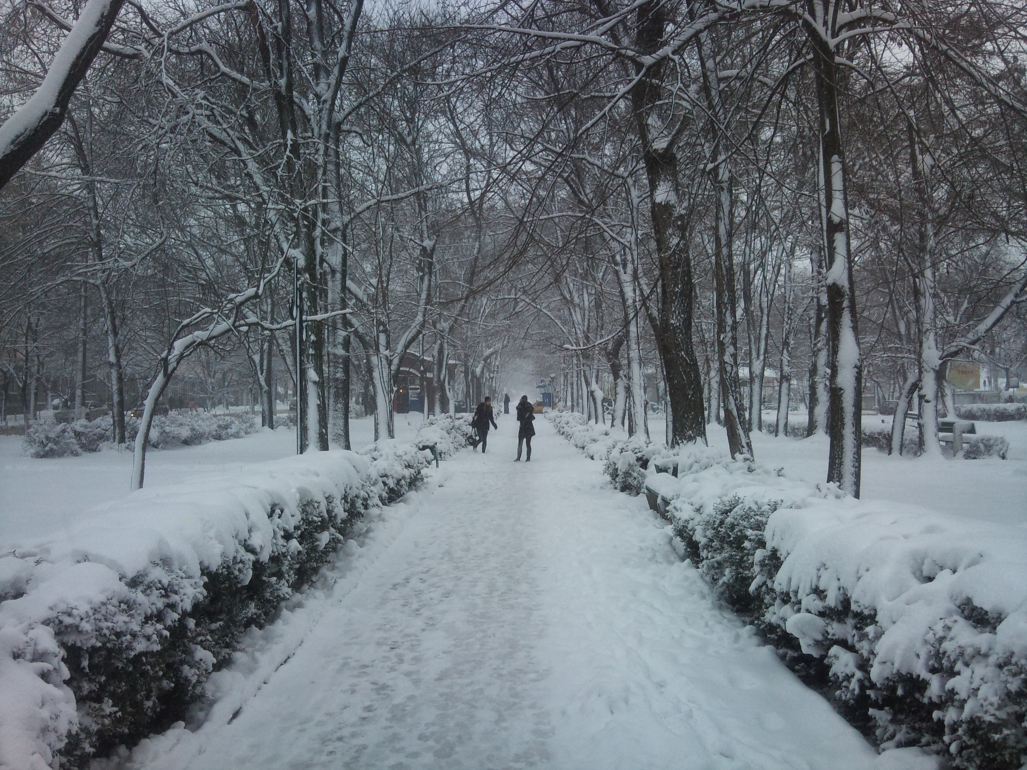 budzhak bessarabiya